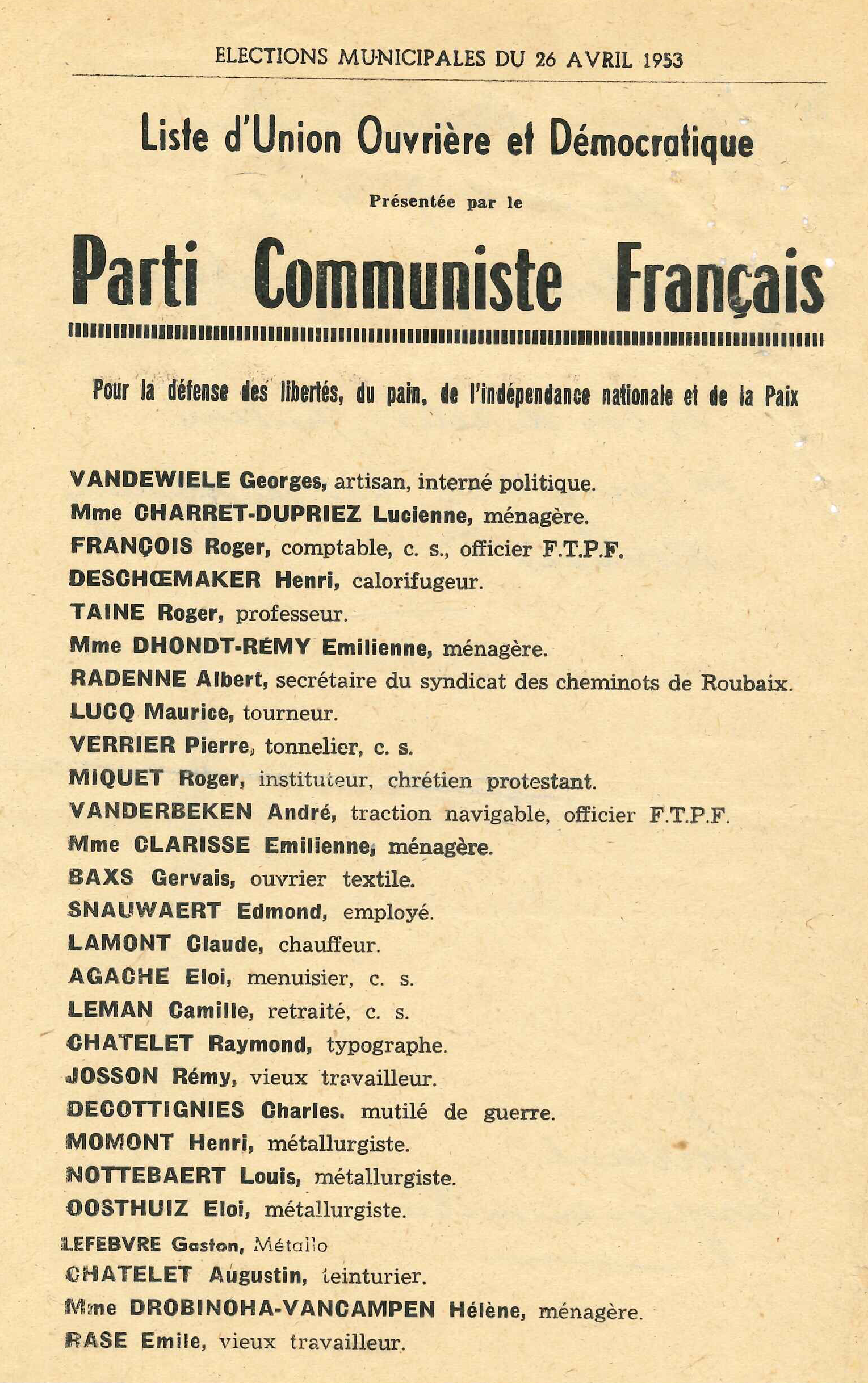 Liste du Parti Communiste de Wasquehal pour les élections municipales de 1953